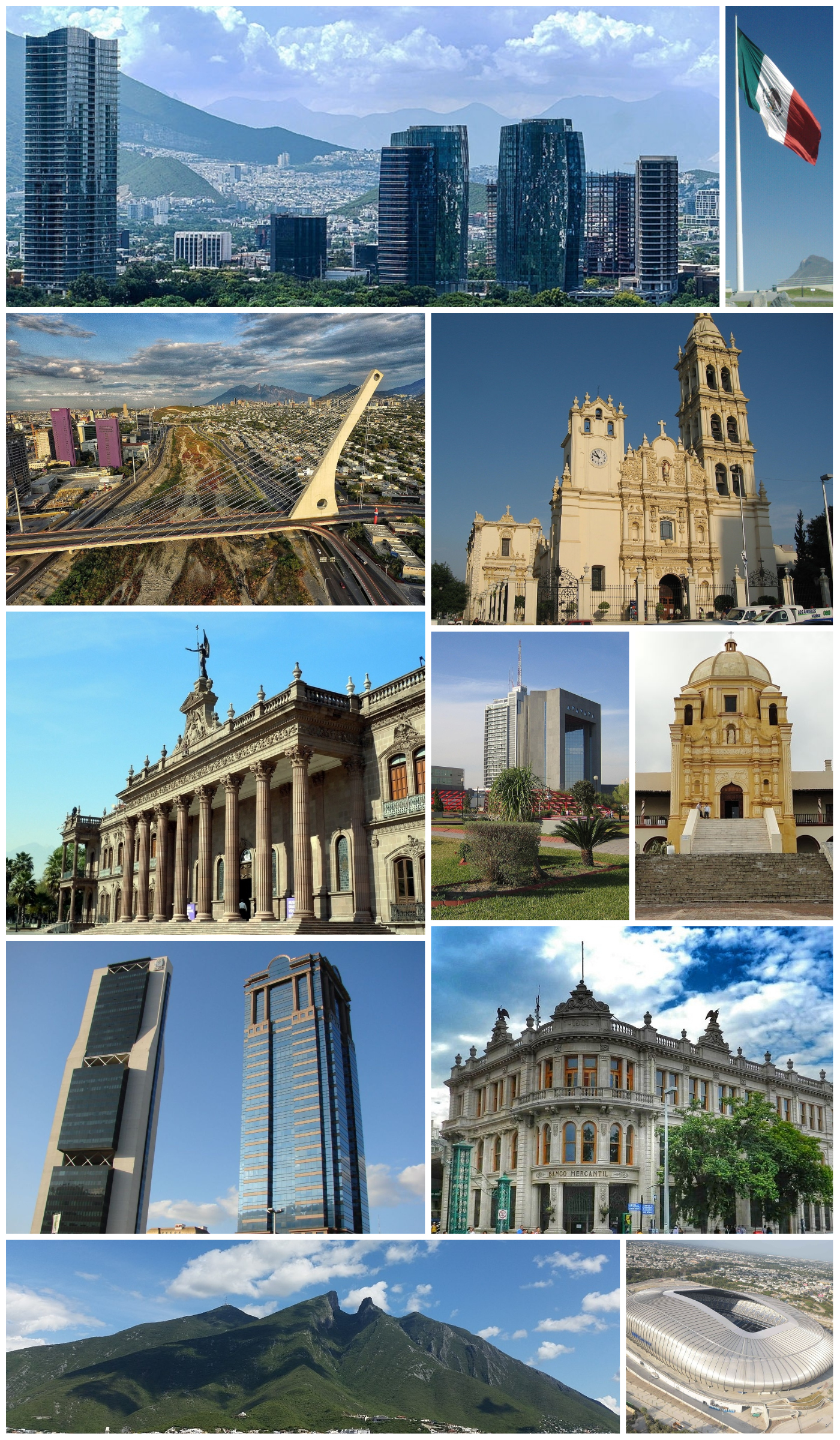 Monterrey